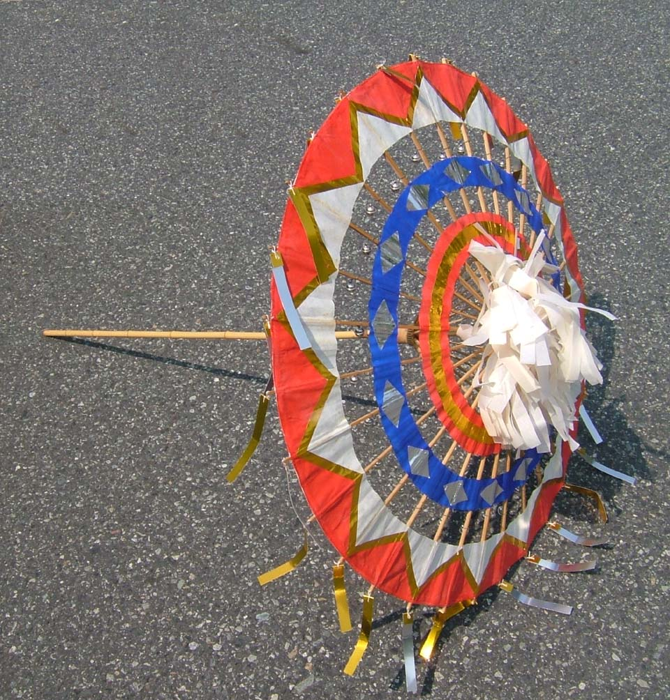 鳥取しゃんしゃん祭踊り傘